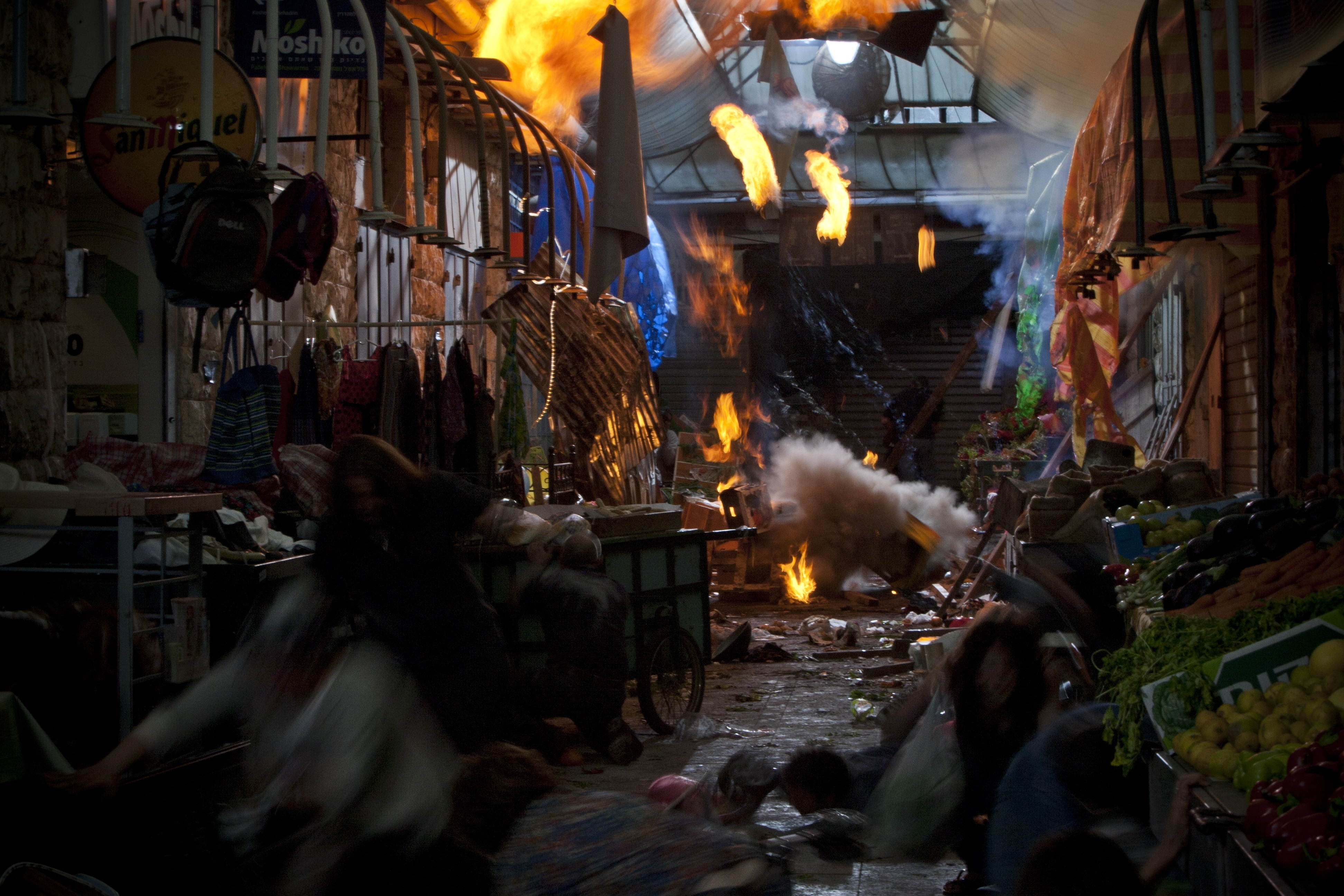 הפיגוע בשוק מחנה יהודה בסרט החיים בינתיים